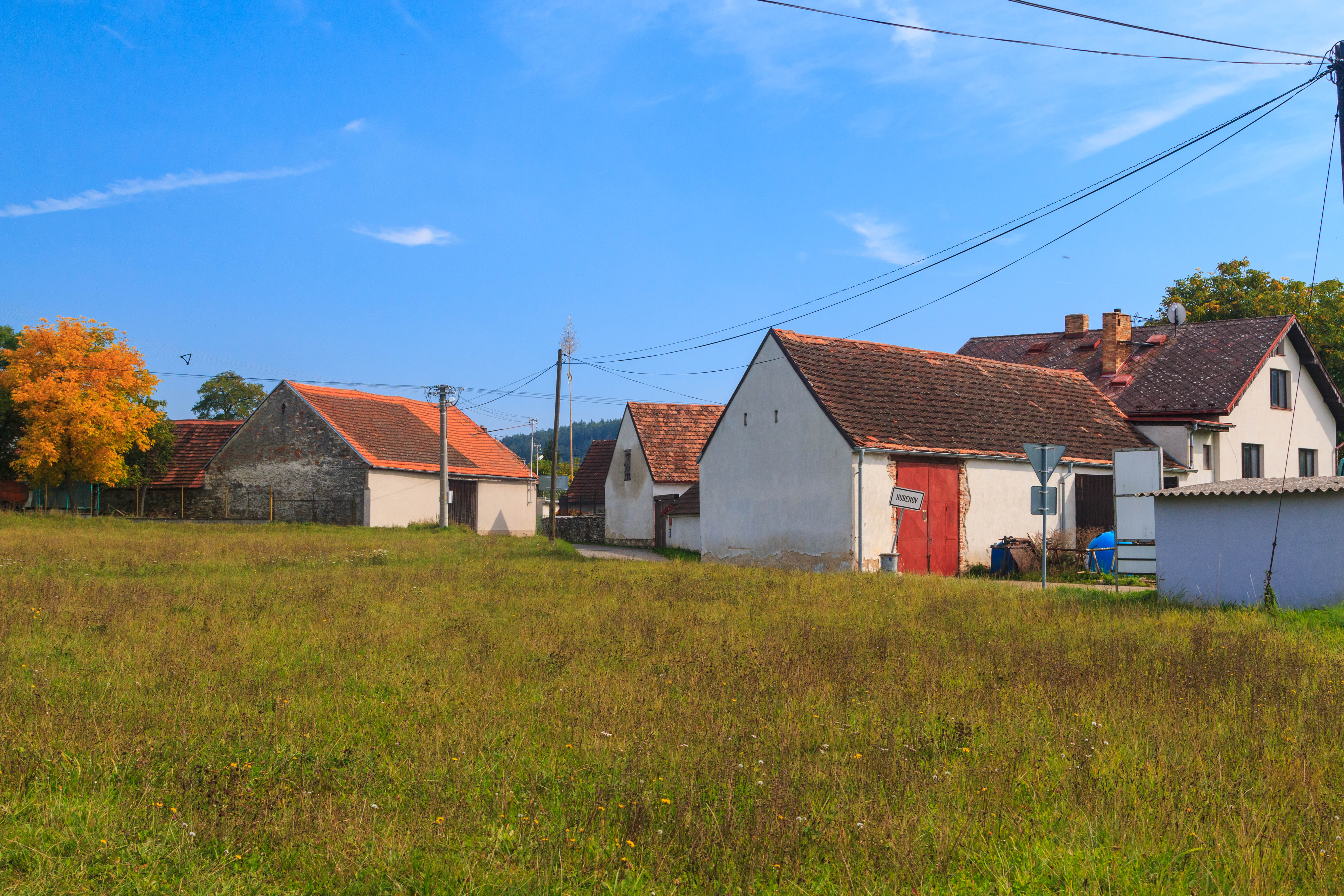 Hubenov u Únic - čp. 8